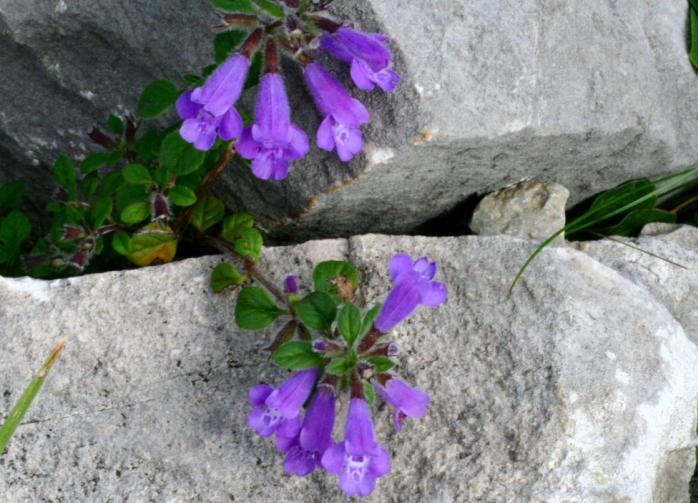 Acinos alpinus